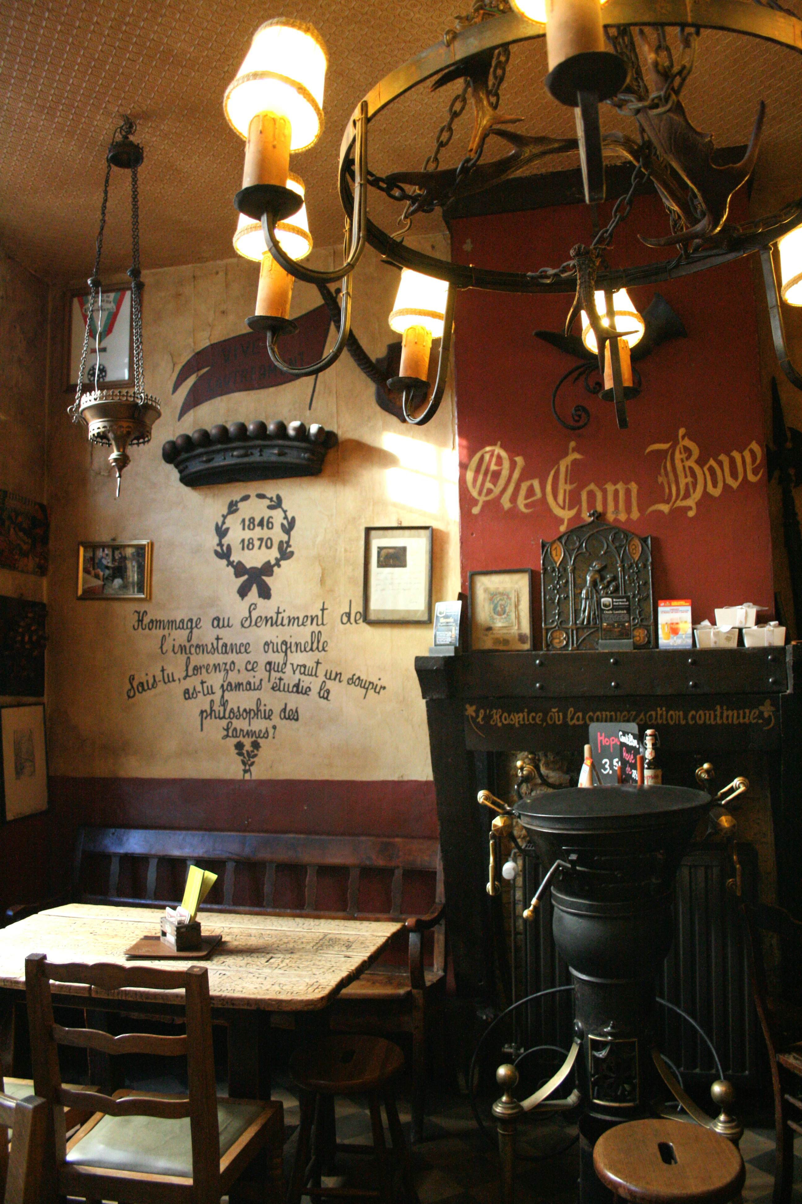 Rue des Alexiens 55, Bruxelles (Belgique). La Fleur en Papier Doré